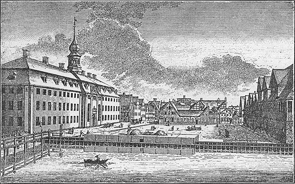 Tugt- og Børnehuset på Christianshavns Torv på et stik fra 1700-tallet.